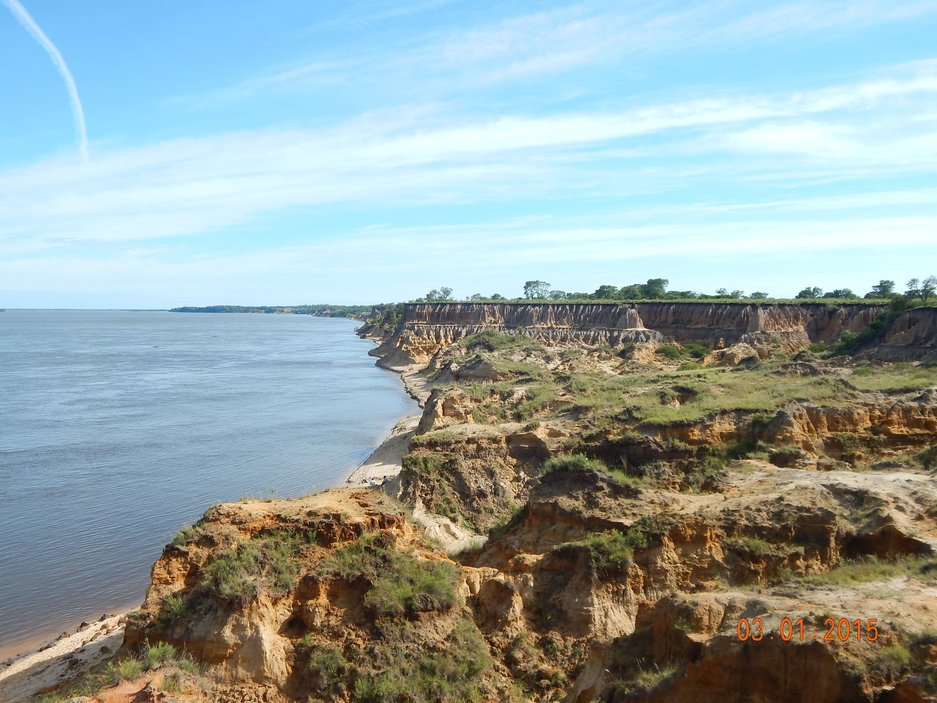 barrancas de Empedrado Corrientes Argentina